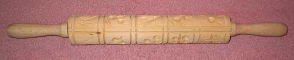 Springerle roller